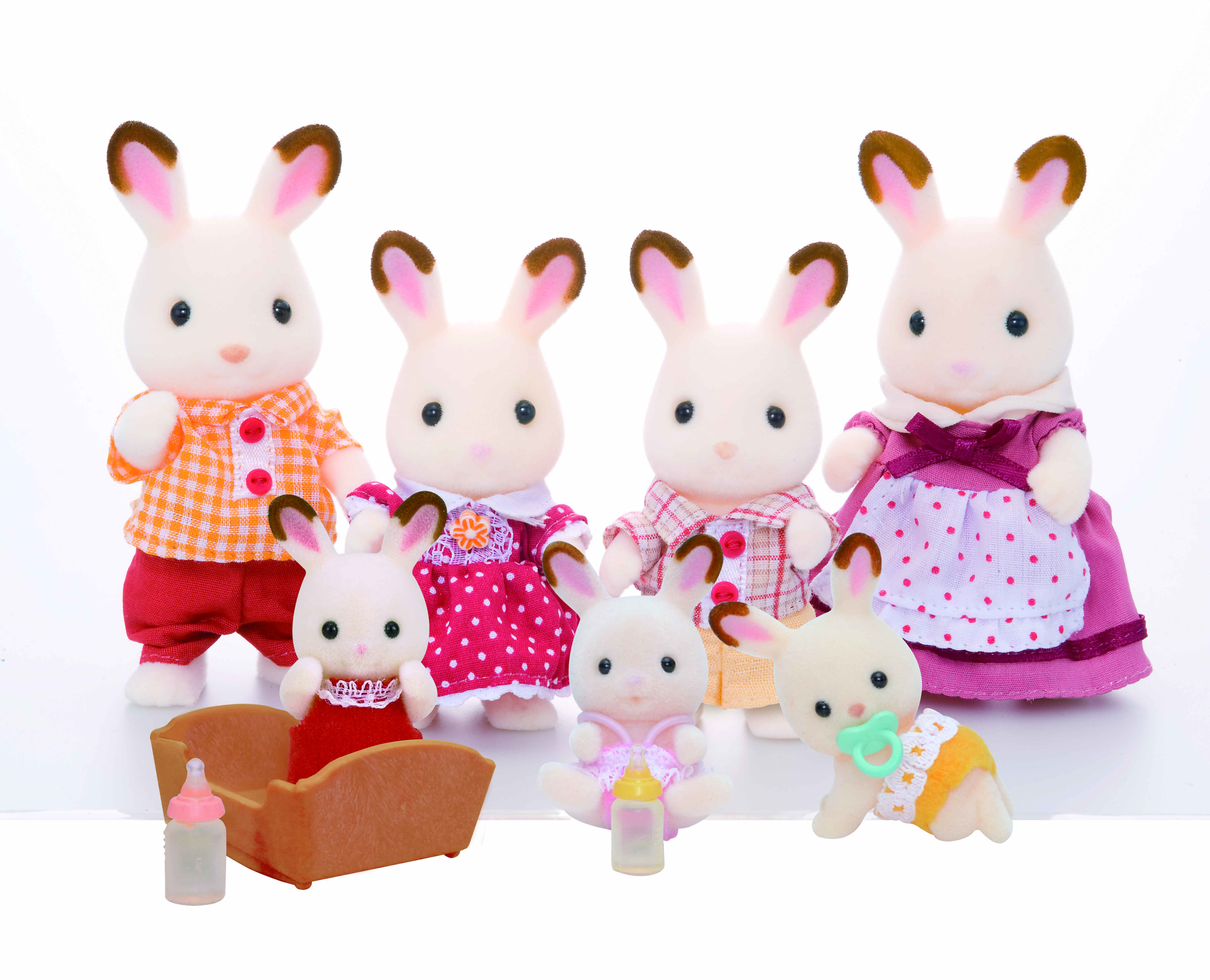 La famille lapin chocolat Sylvanian Families